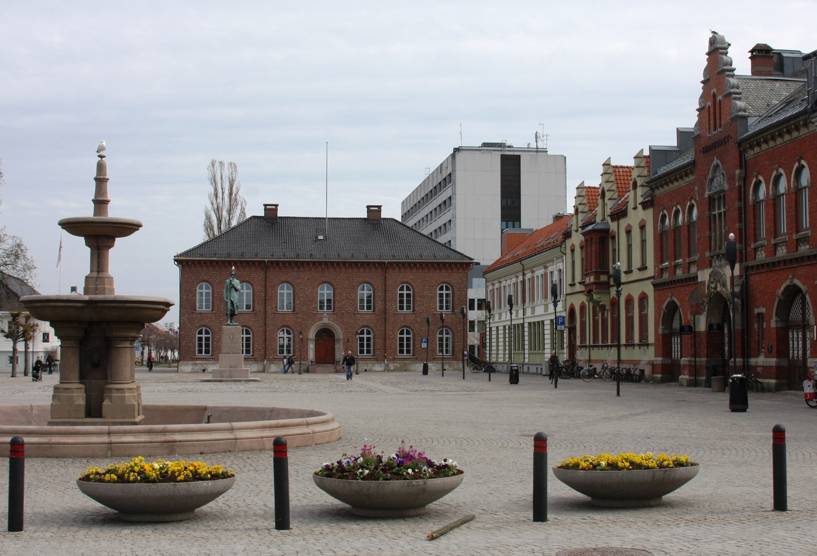 Kristiansand Rådhus og Torget. Murbyen ble bygget etter bybrannen 1892, og det skjedde under murtvang. Hele området har "nasjonal verneinteresse". Ennå ikke tildelt vernestatus eller ID-nummer som kulturminne. Riksantikvaren